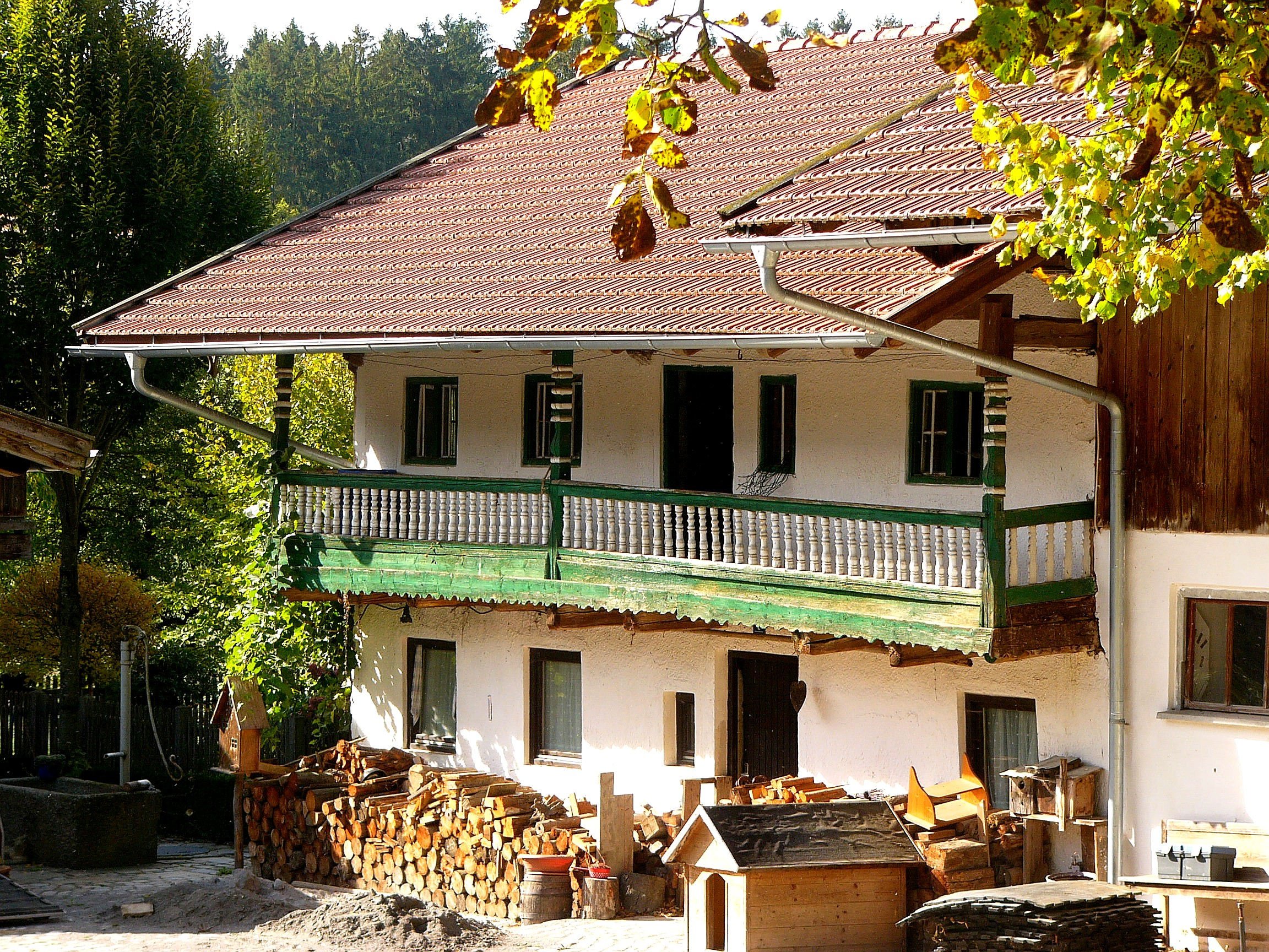 Wohnstallhaus; zweigeschossiger Flachsatteldachbau in Blockbauweise, mit Traufschrot, 18. Jahrhundert. This is a photograph of an architectural monument.